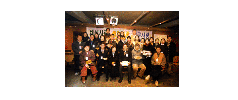 하이텔 채식동호회 첫모임.1999년